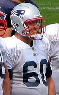 Mike Elgin